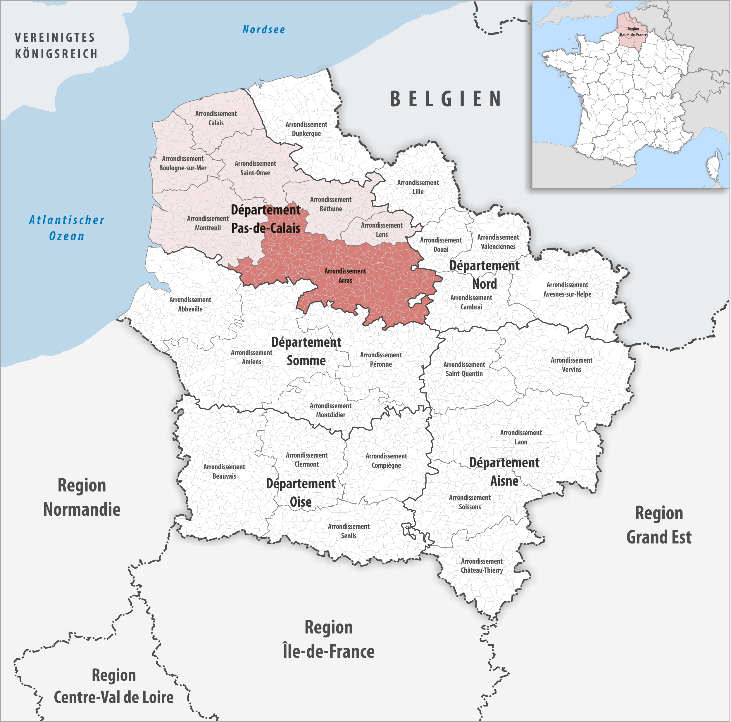 Lage des Arrondissements Arras